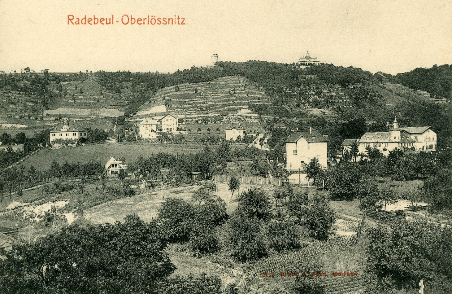 Radebeul; Oberlößnitz This postcard is from publisher Brück & Sohn in Meißen ( postcard has a unique number 09337 and is available in a higher resolution at the publisher. This images was uploaded in a cooperation project between Wikipedians and the publisher.